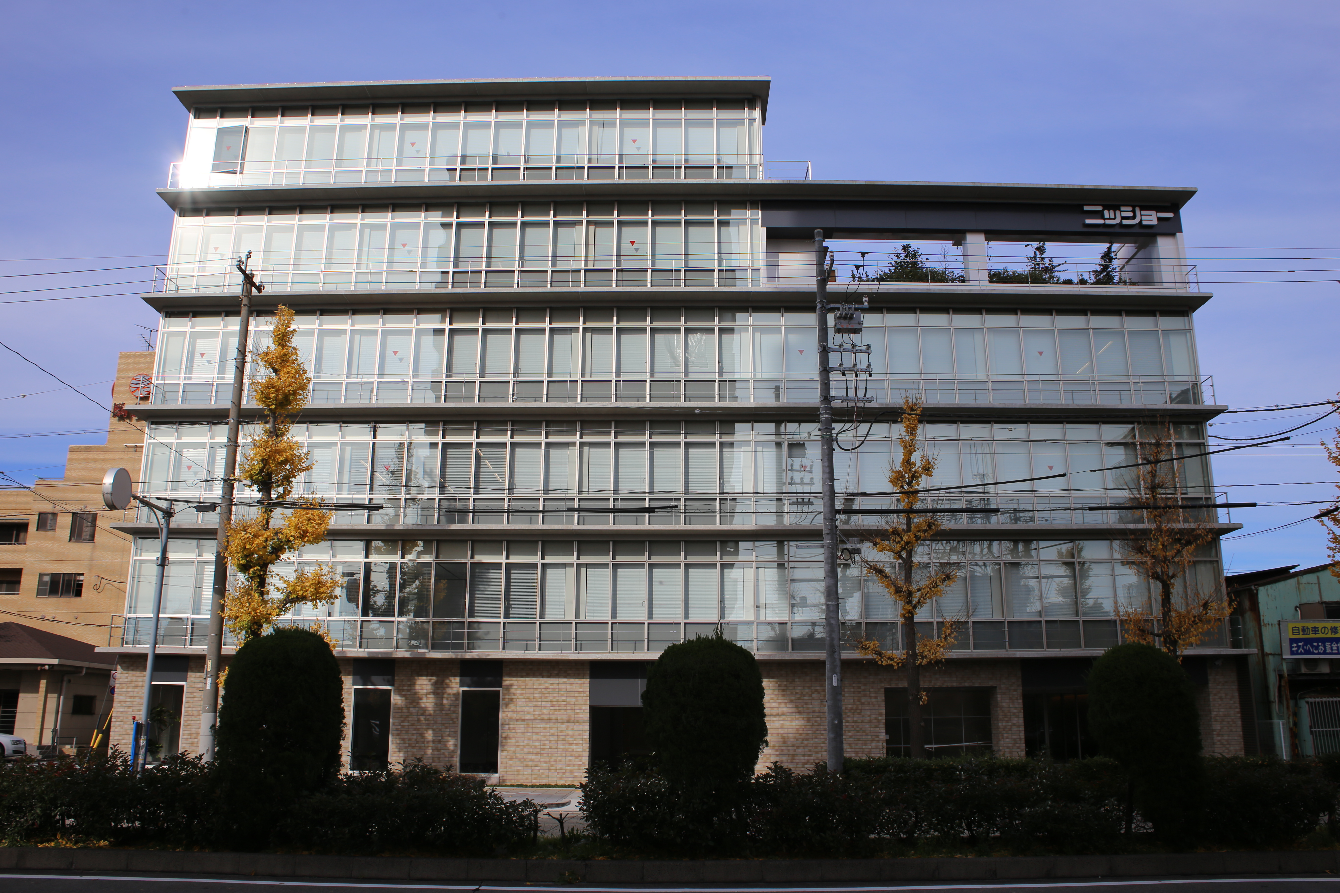 名古屋市北区城見通のニッショー本社